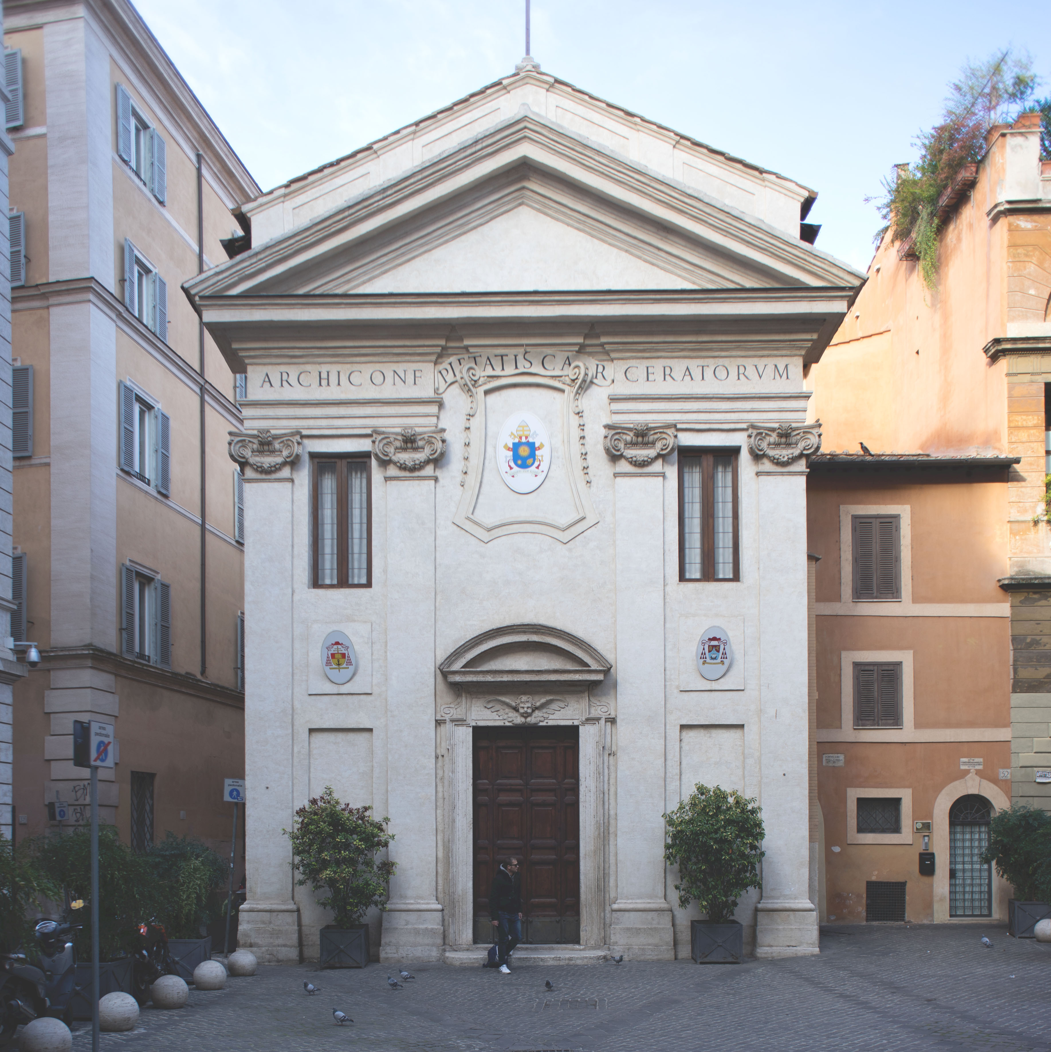 Facciata della Chiesa di San Giovanni della Pigna